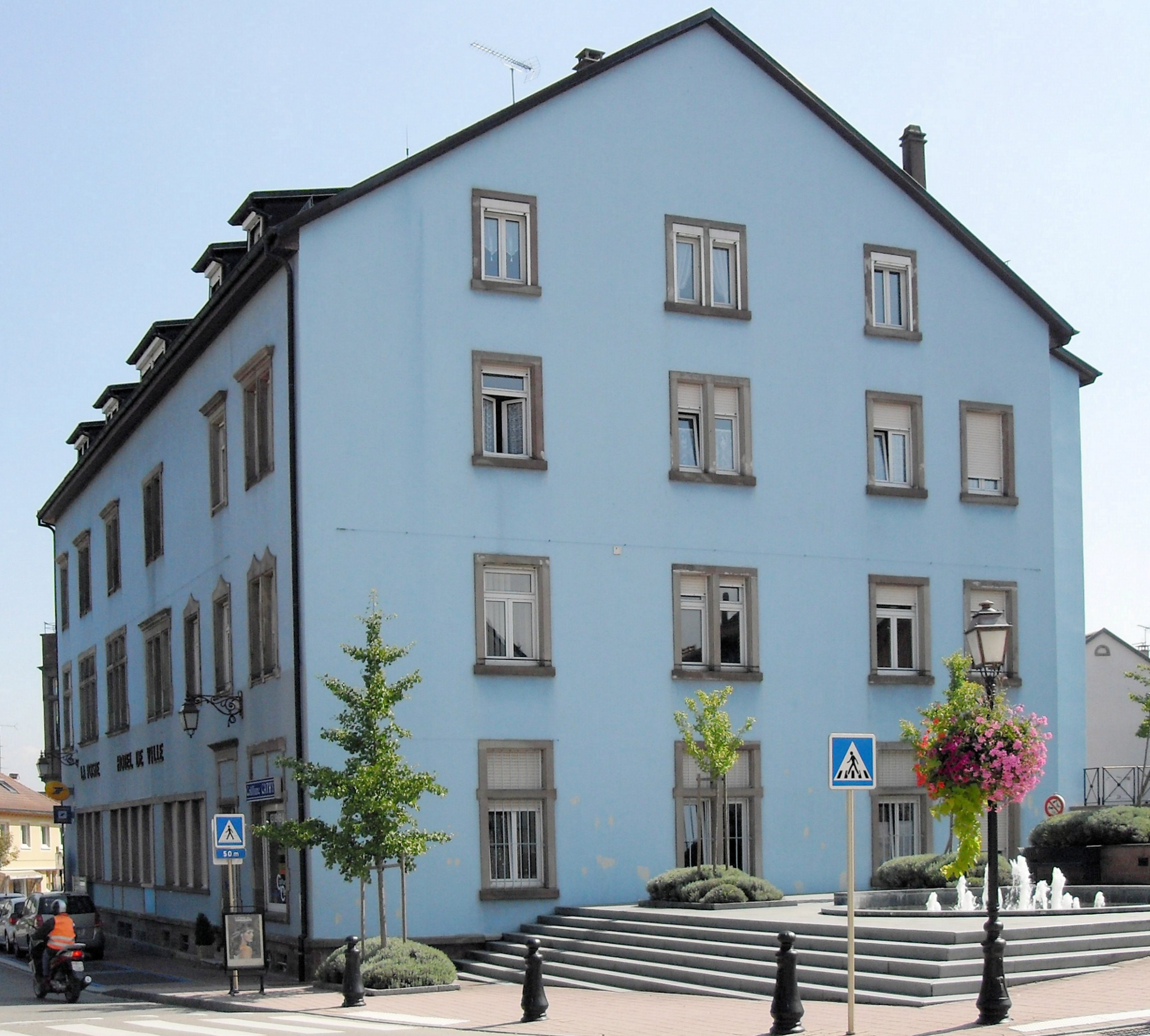 L'hôtel de ville de Hégenheim